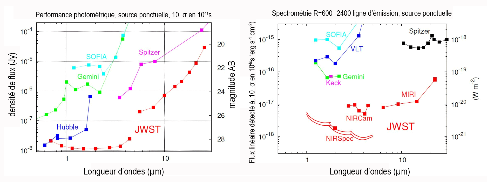 Performances photométrique et spectrométrique du télescope spatial infrarouge JWST